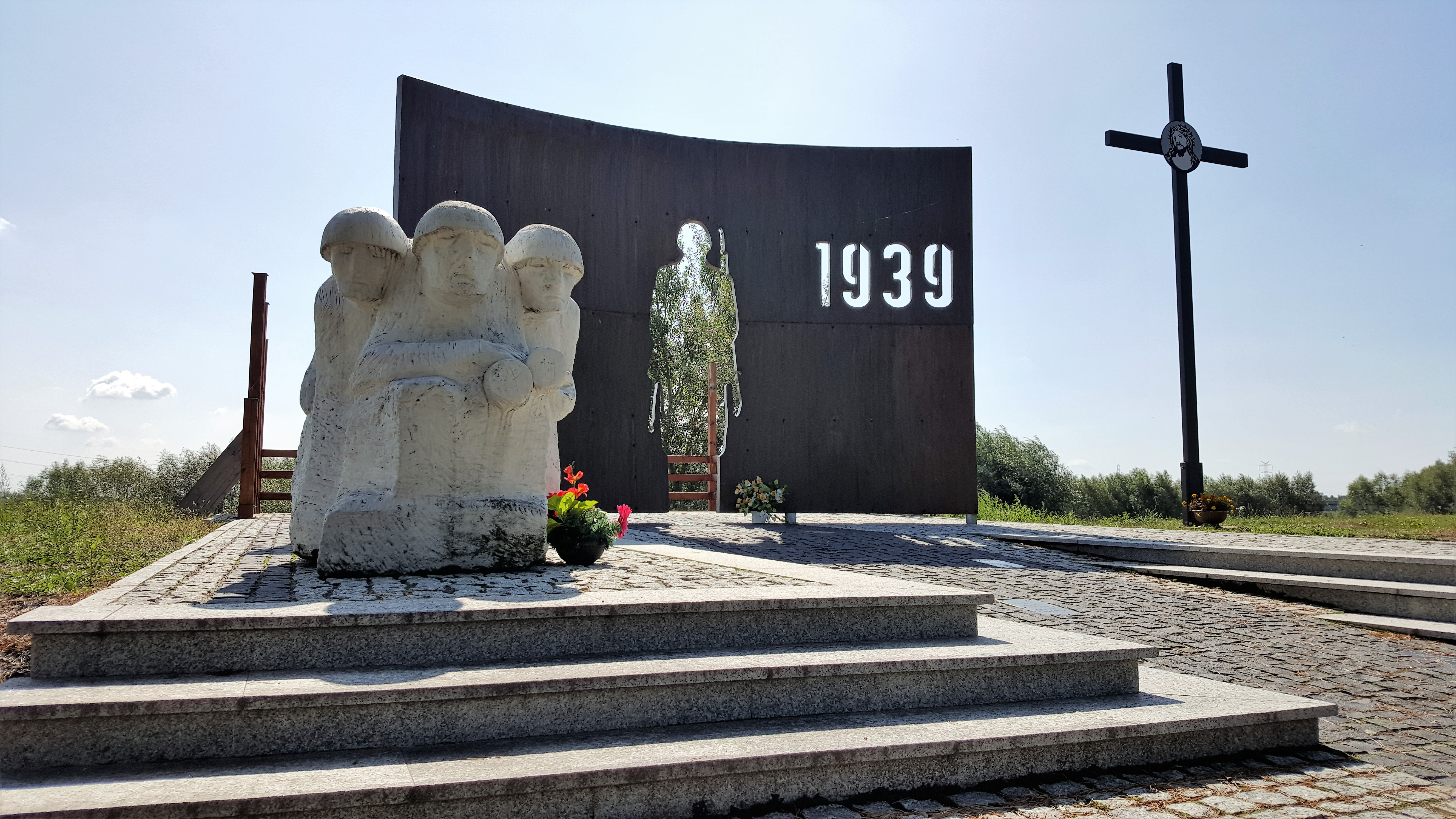 Biskupice Radłowskie. Pomnik Bohaterów Września 1939.